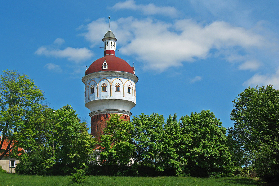 Wodna wieża ciśnień, w użyciu do lat 70-tych XX wieku. Obecnie atrakcja turystyczna.